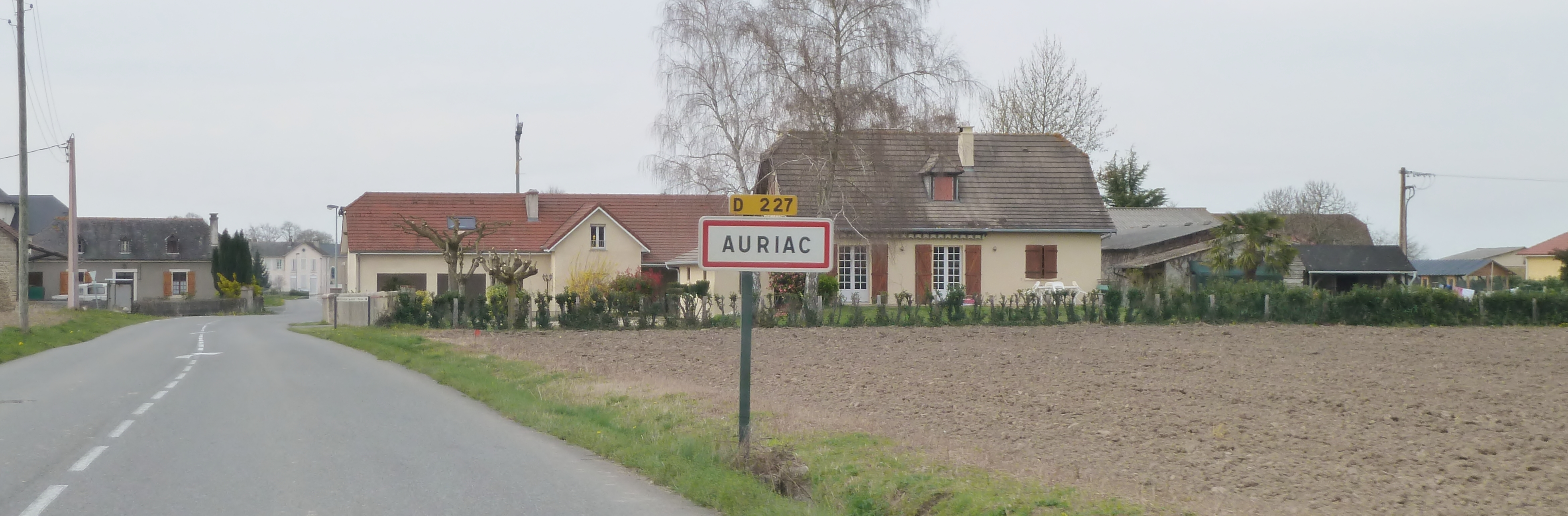 Entrée dans Auriac (Pyrénées-Atlantiques)